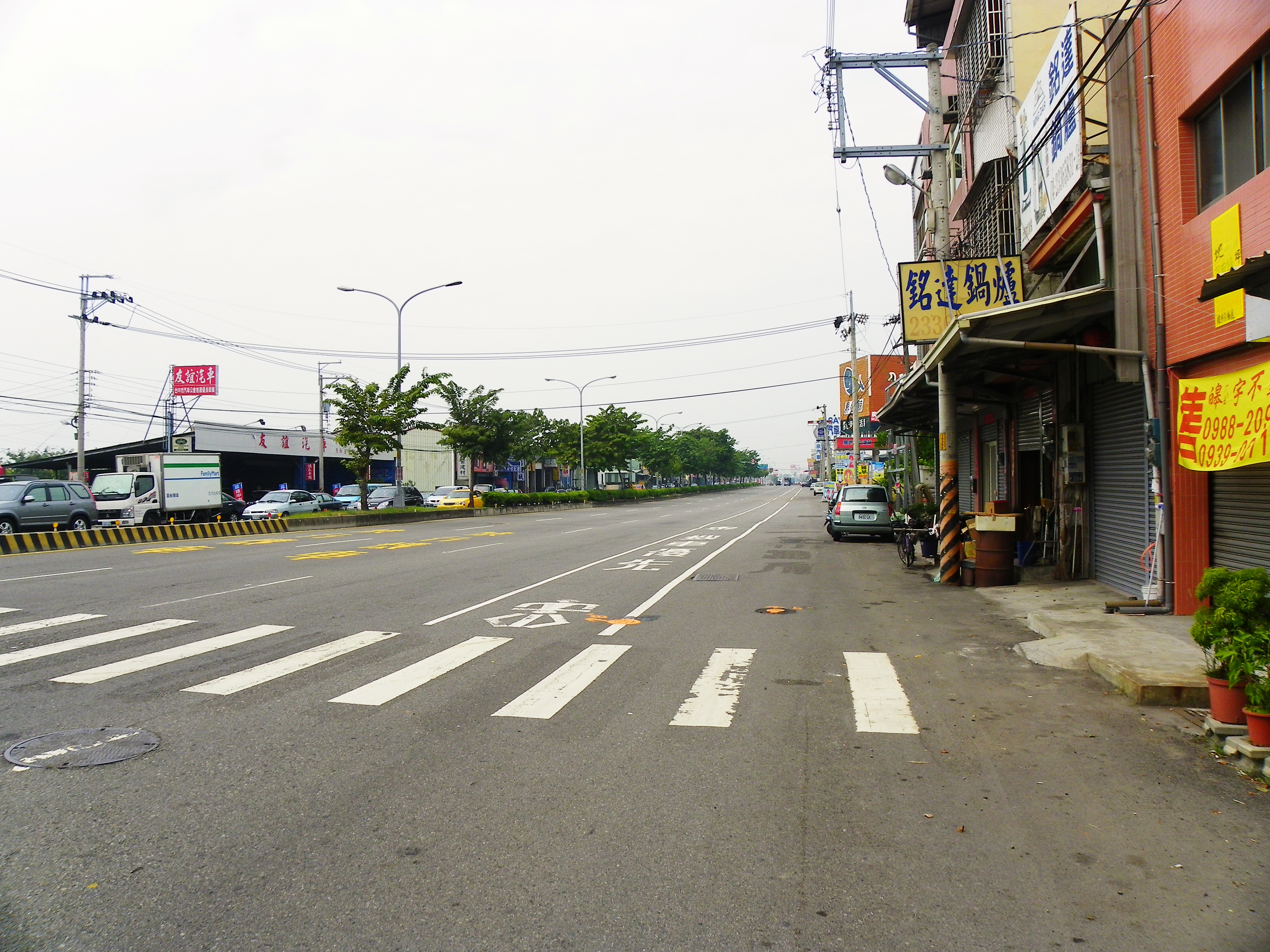 中文（台灣）: 臺中市烏日區中山路三段，攝於中山路三段與高鐵路一段路口。